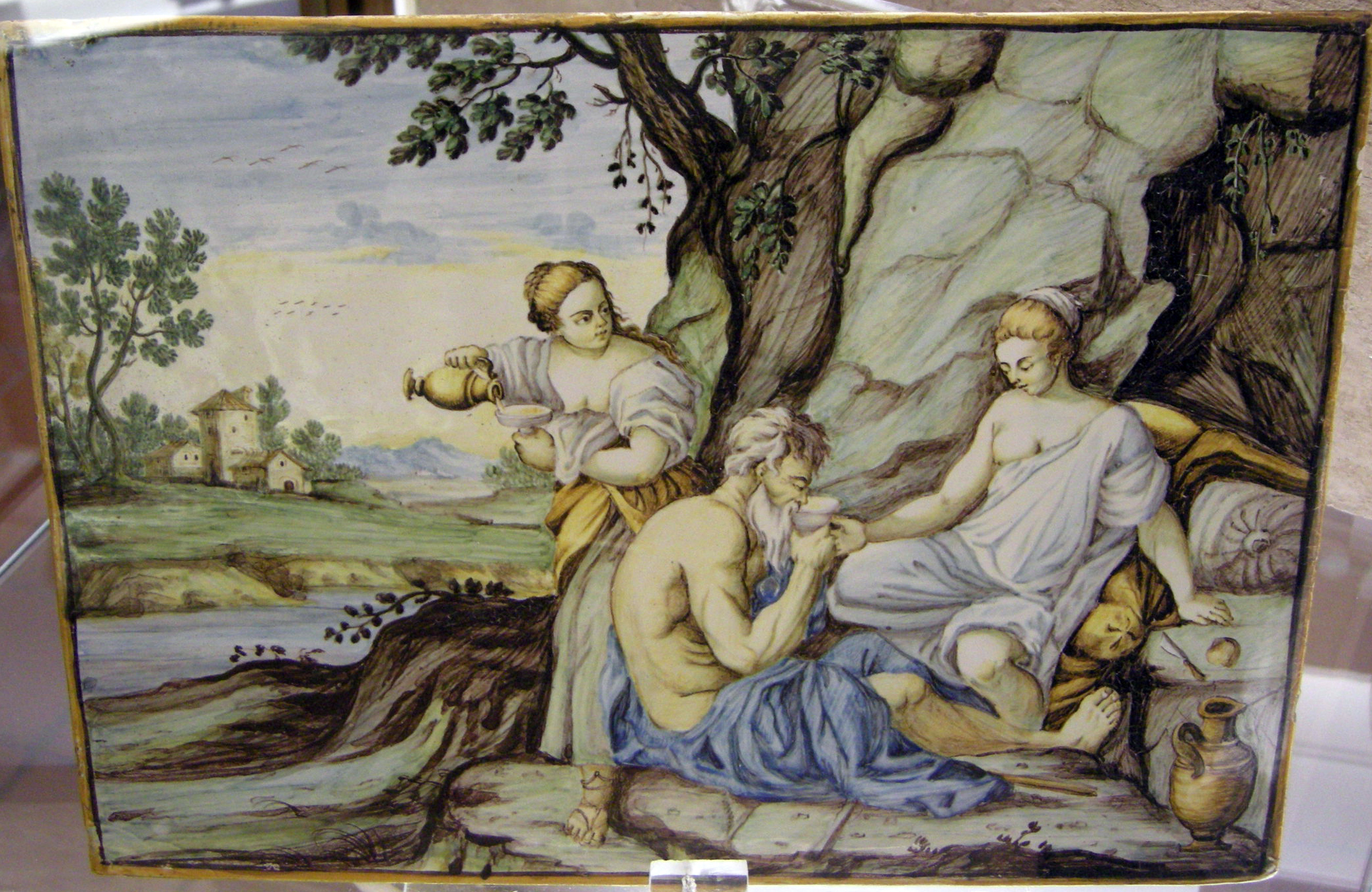 Palazzo Ducale di Urbino - Galleria Nazionale delle Marche - MIBAC This is a photo of a monument which is part of cultural heritage of Italy.